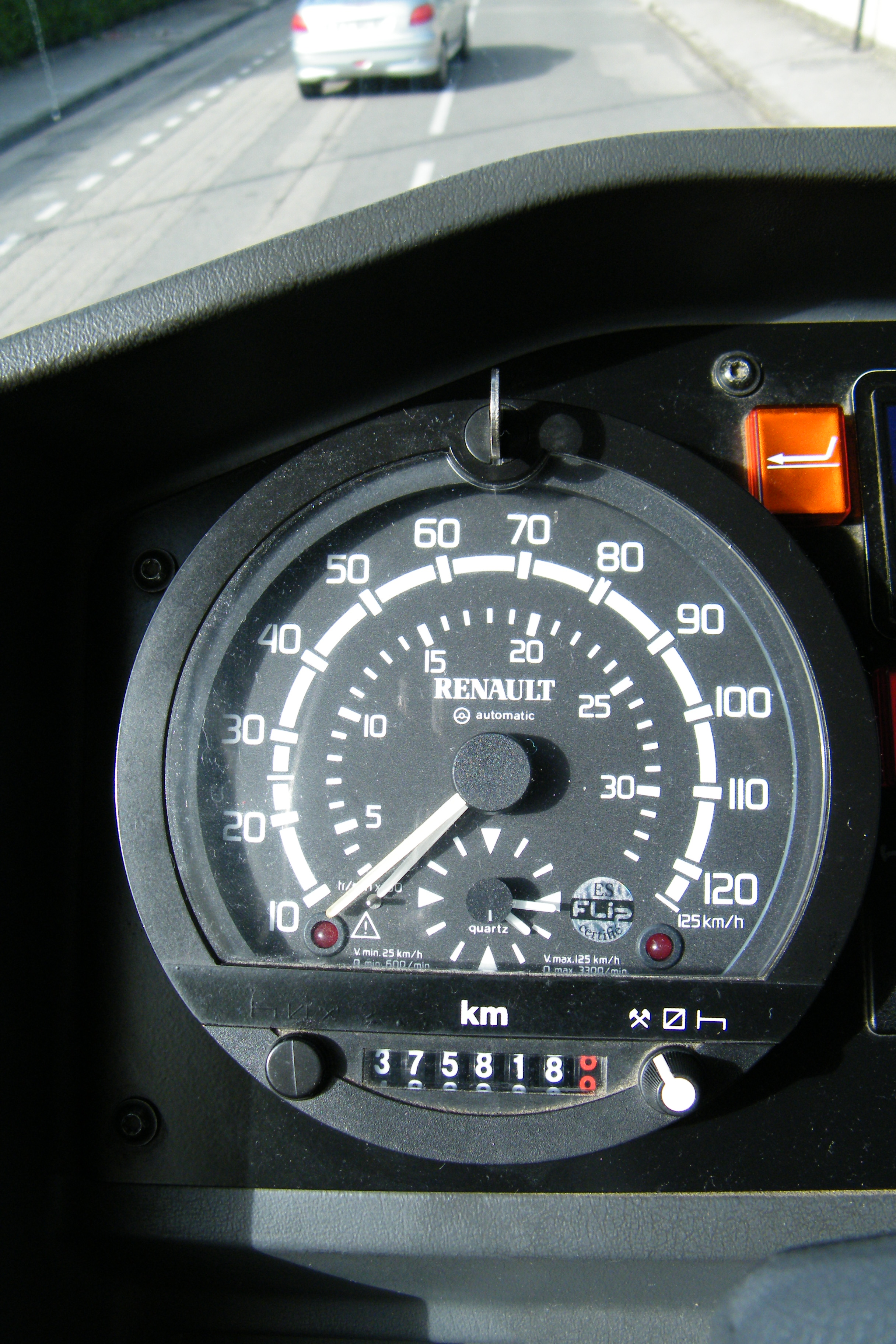 Chronotachygraphe analogique sur un R.V.I. Tracer.